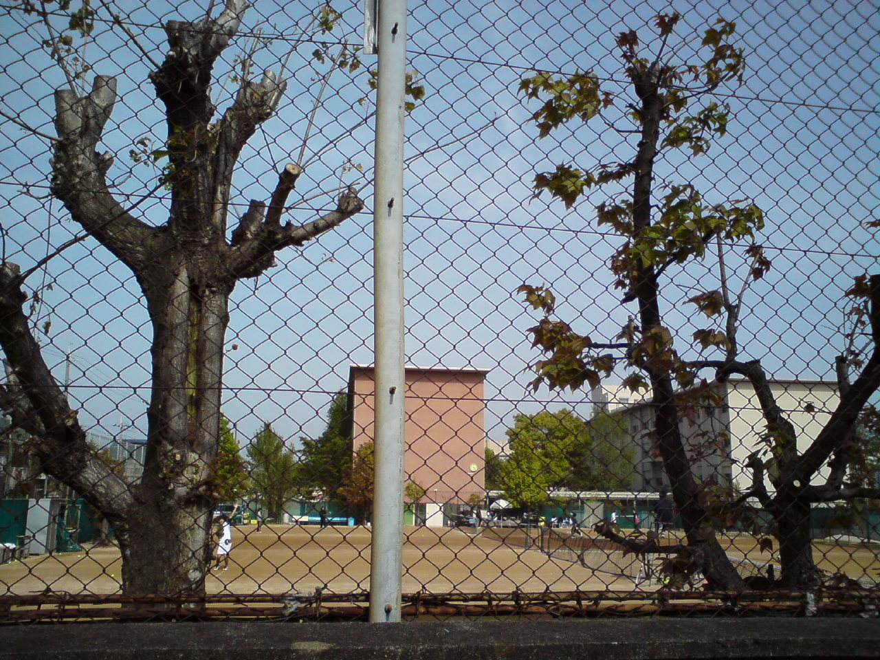 三島高等学校